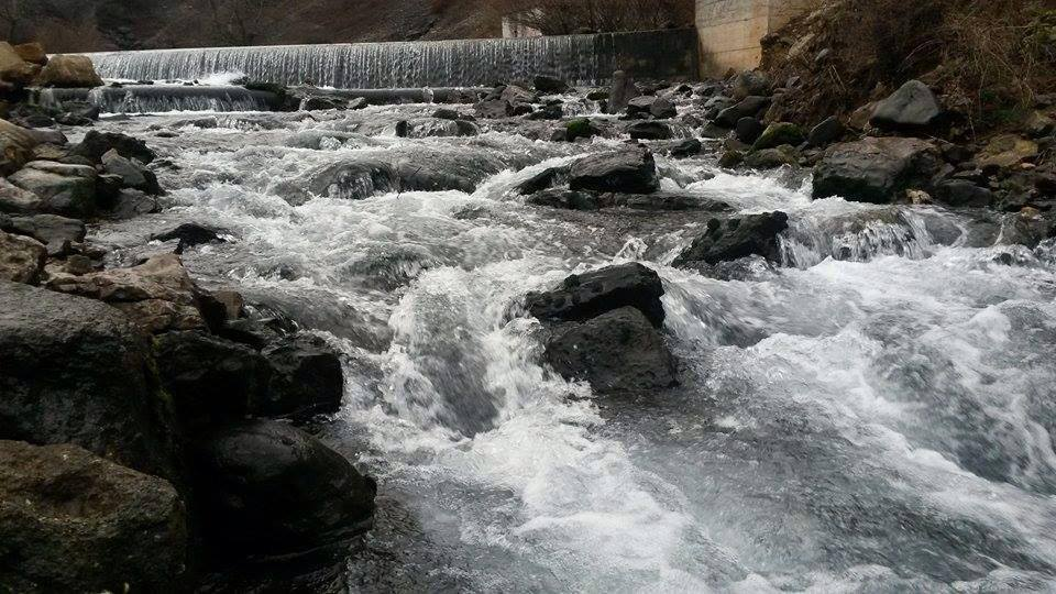 Burimi i Lumit te Krumes gjate sezonit te reshjeve